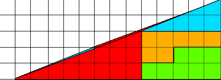 Uitwerking van de wigparadox.